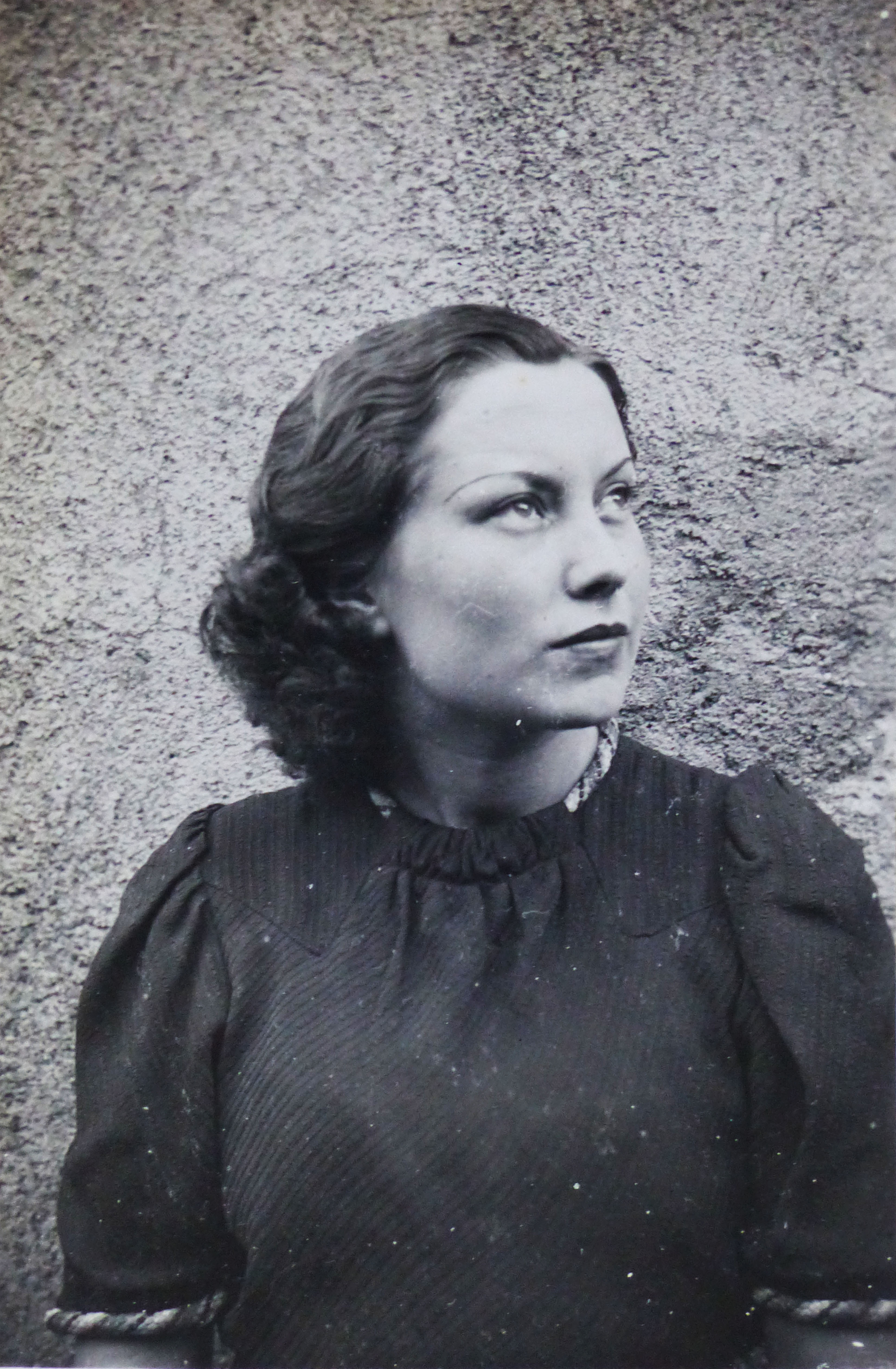 Lucie Pelletier (originaire de Scey-sur-Saône et future épouse Jean Collot) photographié à Vesoul en 1936.